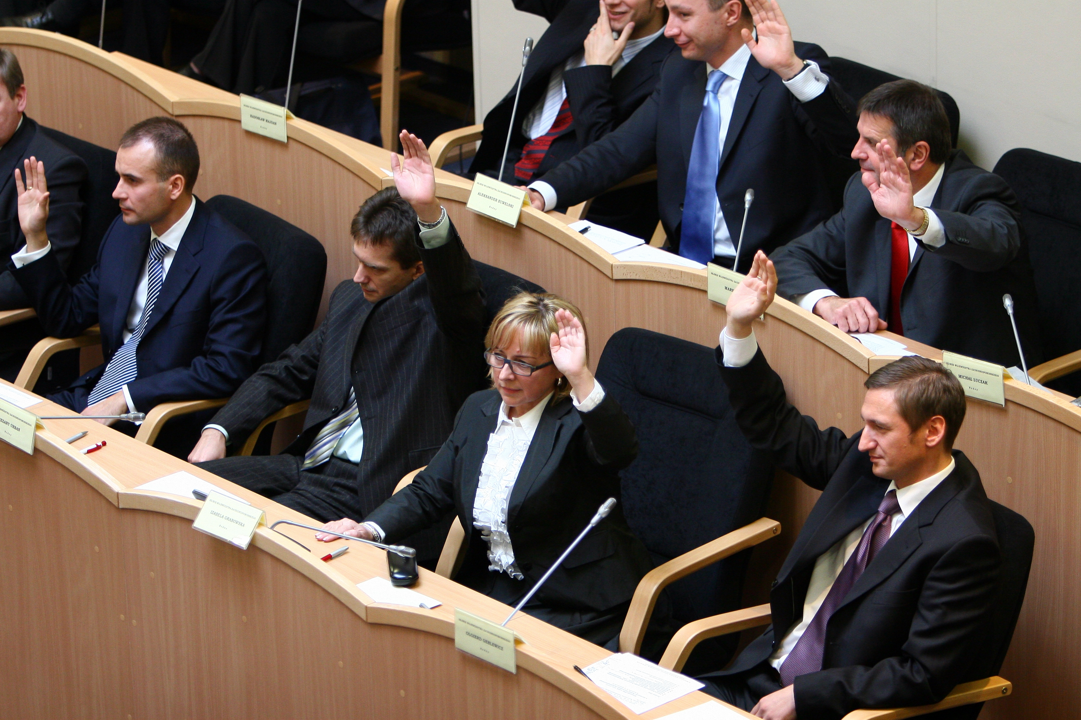 Radni podczas głosowania na pierwszej sesji Sejmiku III kadencji